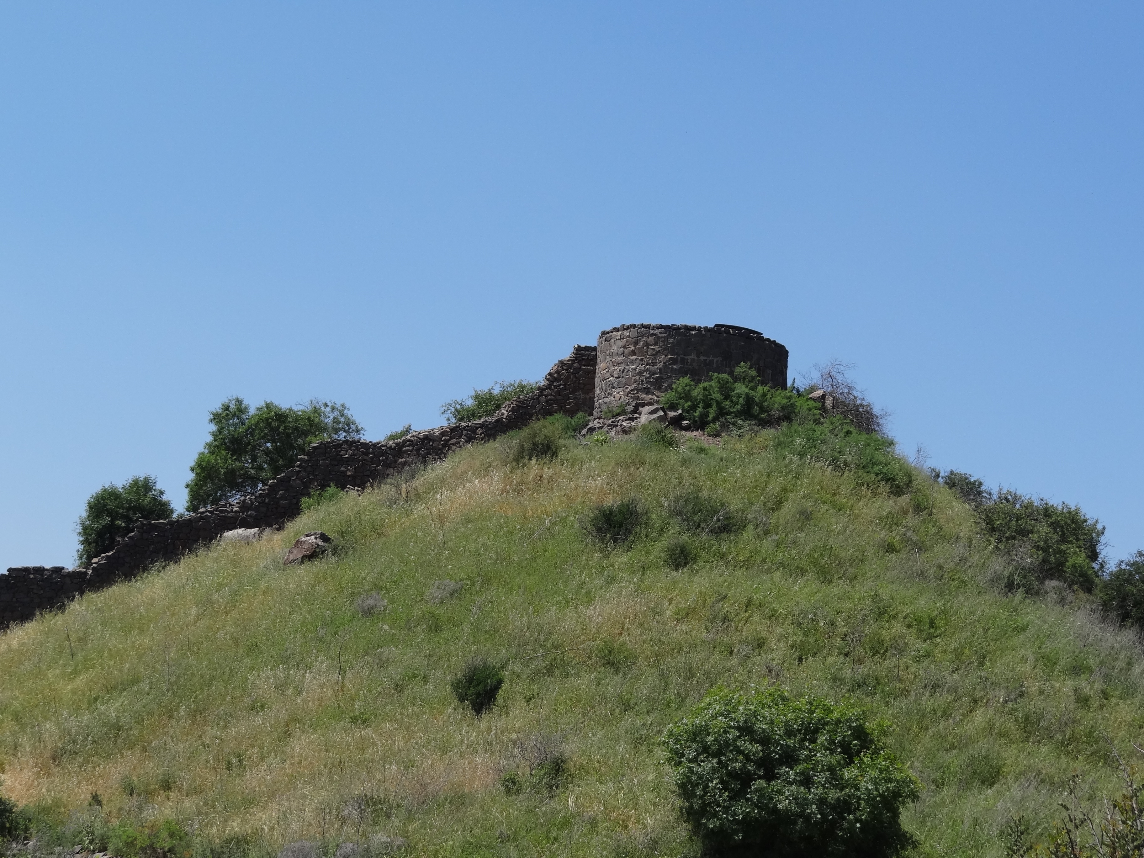 Gamla archaeology site אתר ארכאולוגי גמלא ברמת הגולן המגדל העגול ושרידי החומה